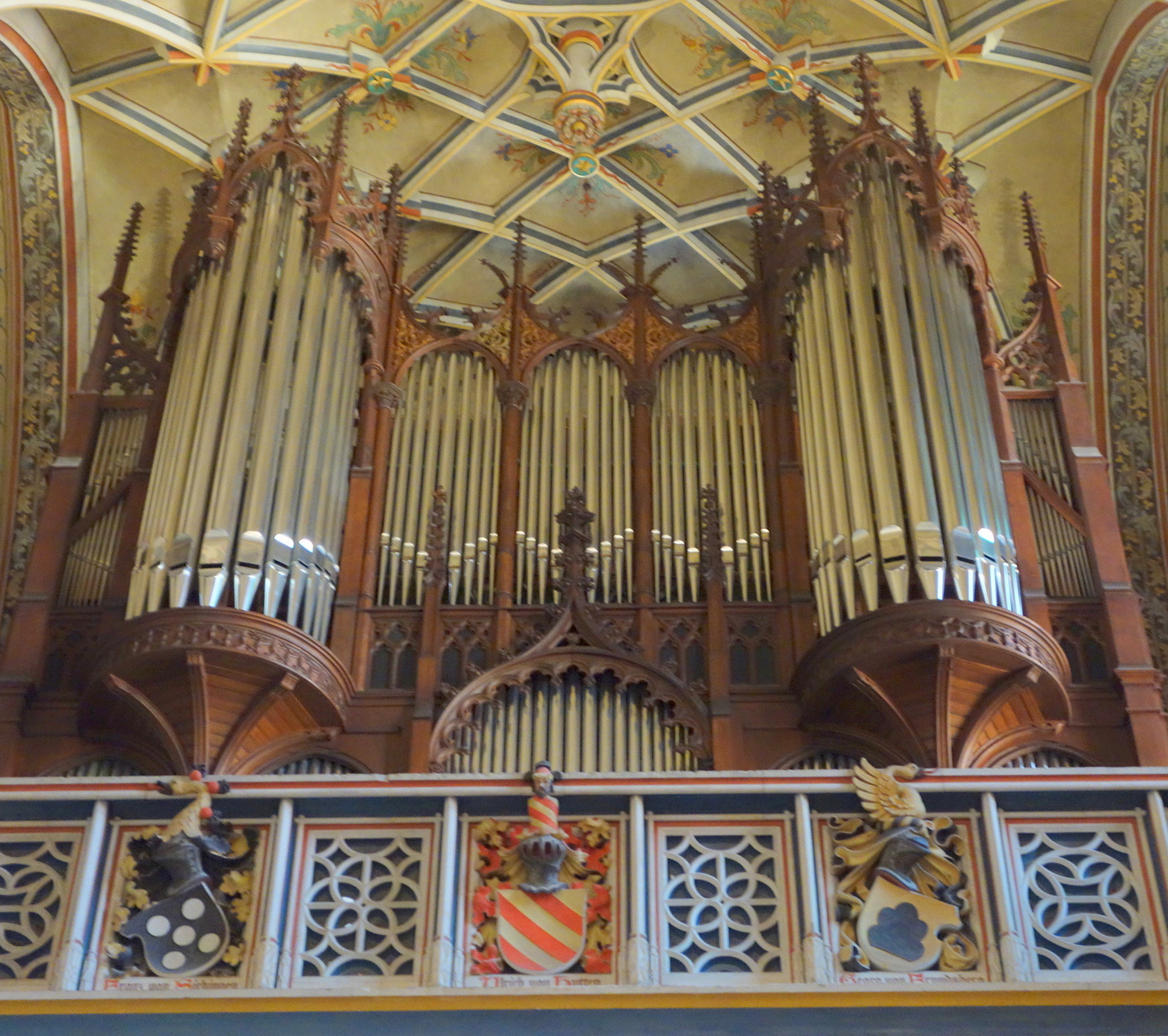 Orgel der Schlosskirche Wittenberg, Landkreis Wittenberg, Sachsen-Anhalt, Deutschland